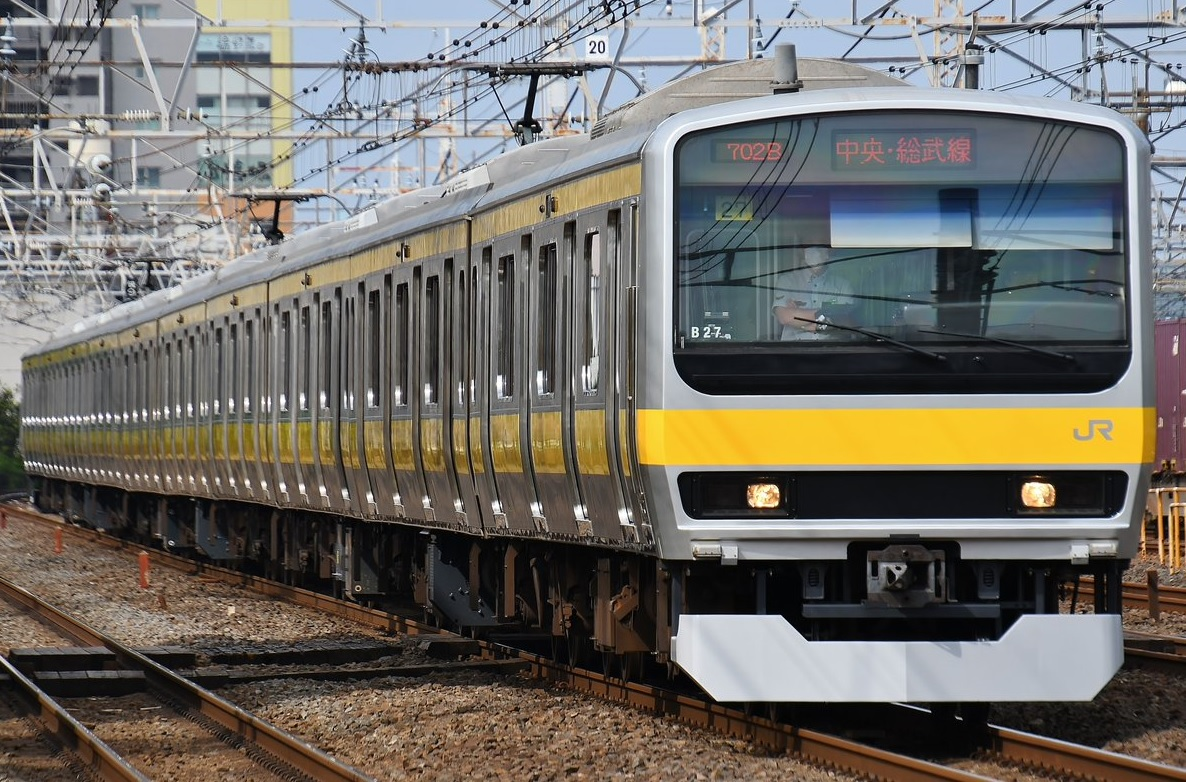 総武緩行線を走行するE231系0番台ミツB27編成